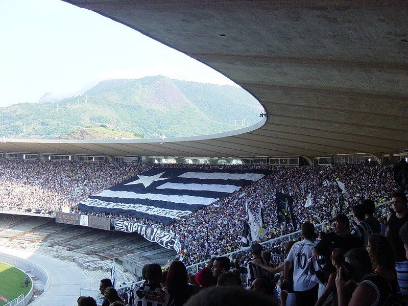 Foto da torcida do Botafogo de Futebol e Regatas no Maracanã tirada por mim